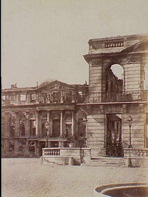 Le château de Saint-Cloud après l'incendie de 1870